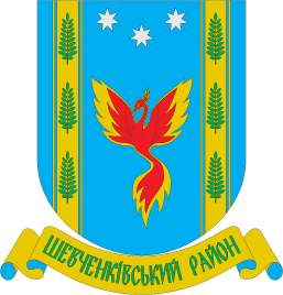 Герб Шевченківського району (Дніпро)